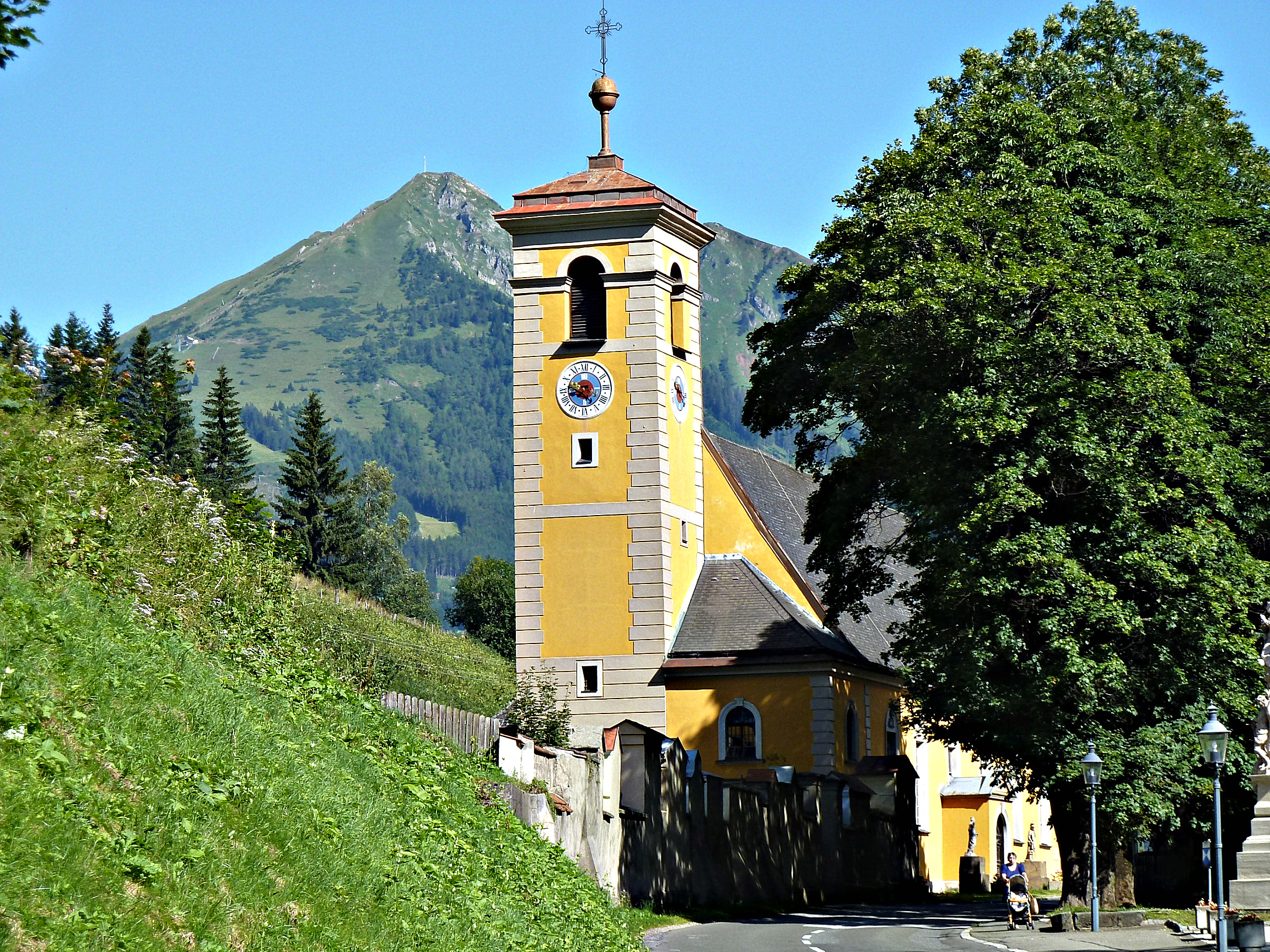 Kath.Pfarrkirche Mariä Himmelfahrt Vordernberg, im Hintergrund der Polster